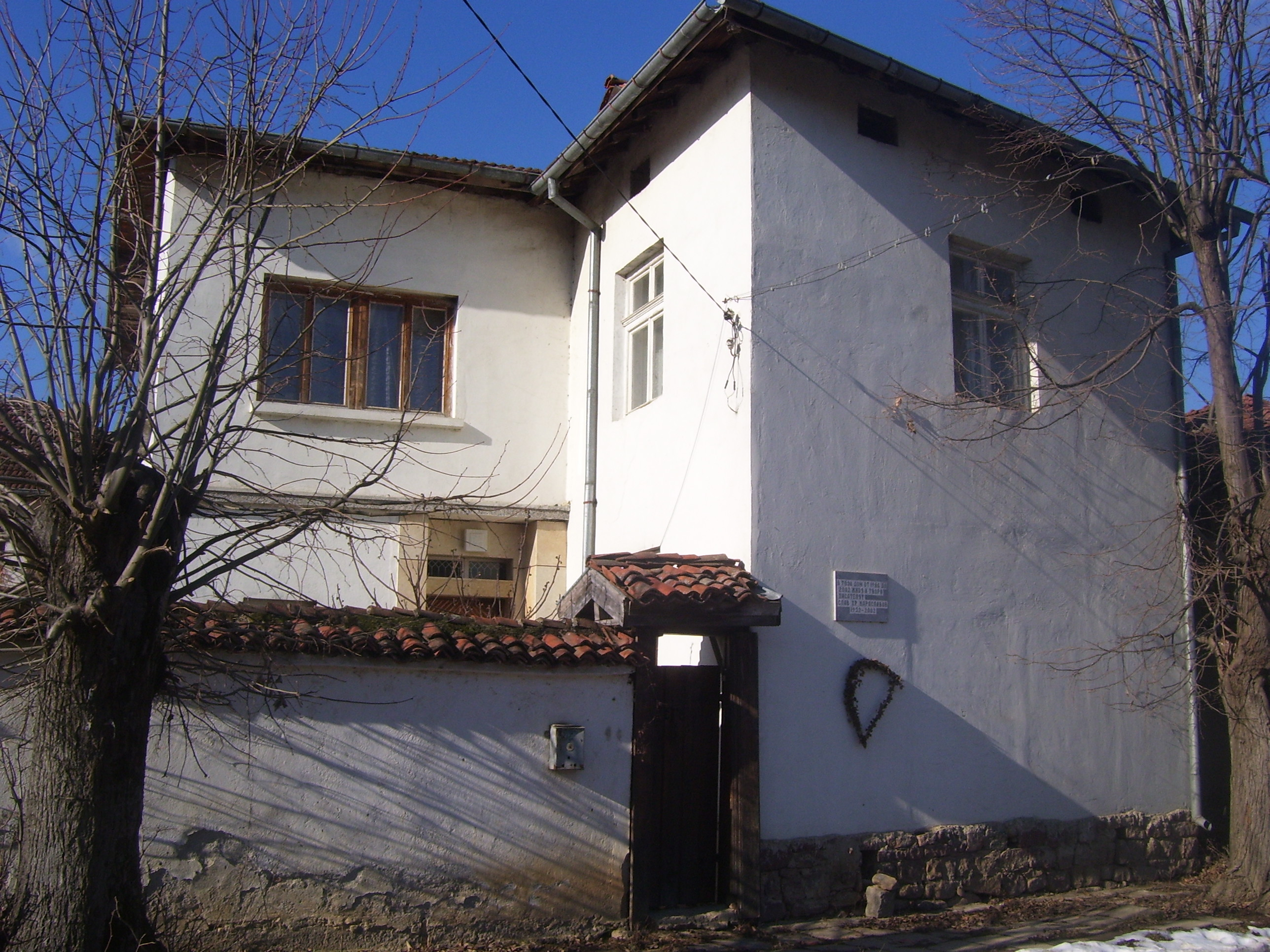 Къщата на писателя Слав Христов Караславов в село Литаково, България.